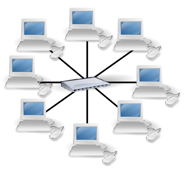 Debuxo realizado a partir de e